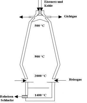 Schema eines Hochofens